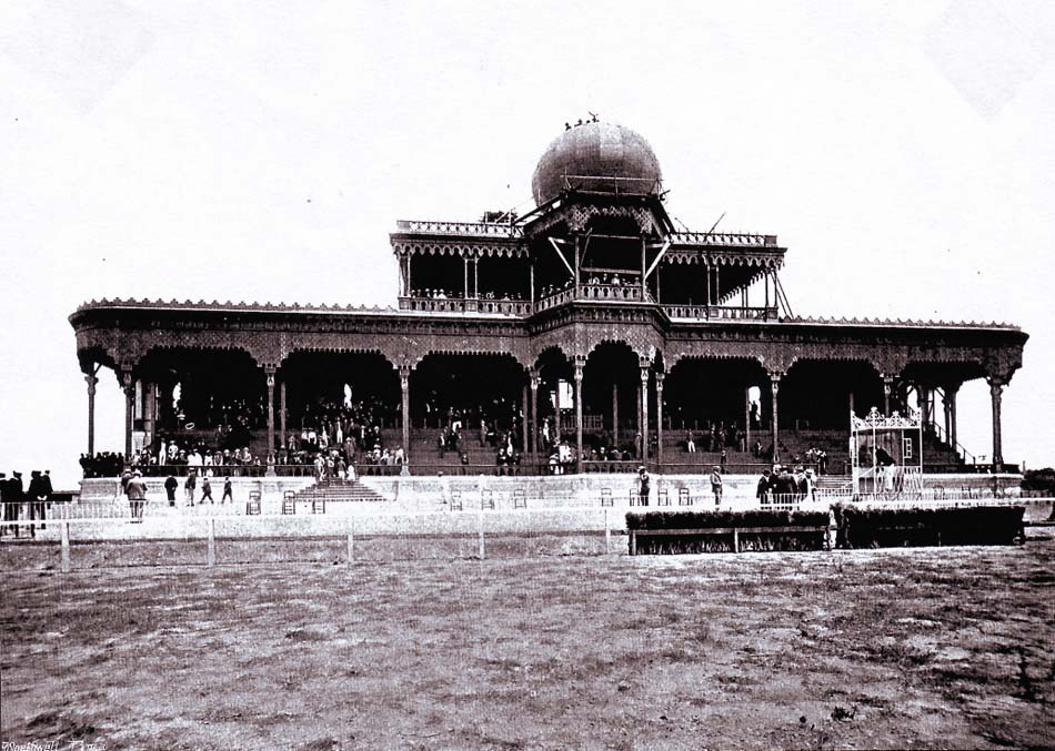 Vista de las Tribunas del Hipódromo de Santa Beatriz en Lima. Foto Archivo Fotográfico Courret.